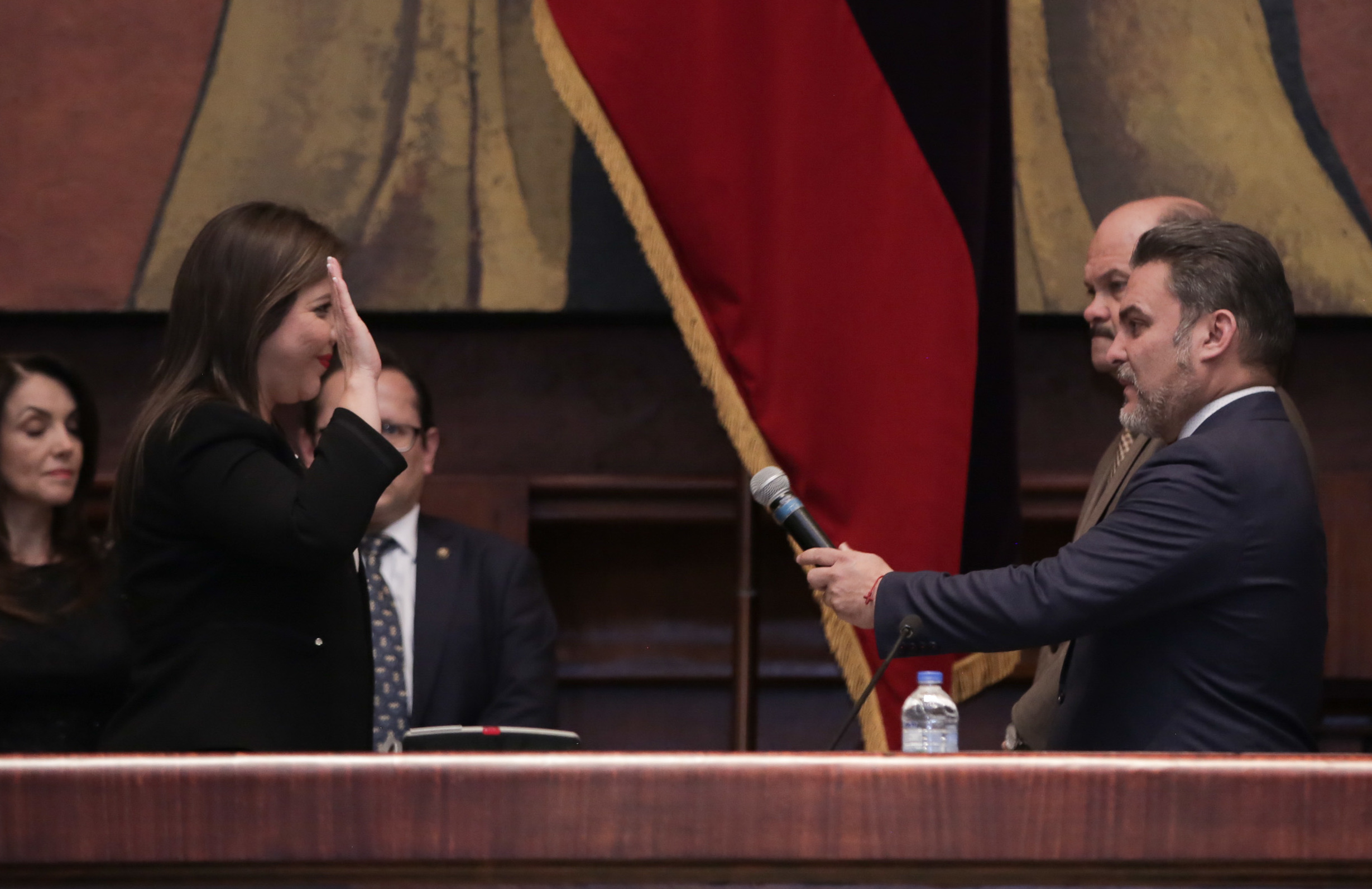 TEMA: 1. Himno Nacional de la República del Ecuador; 2.Conocimiento del Oficio No. T001-SGJ-18-0011 de 4 de enero de 2018, suscrito por el señor Presidente Constitucional de la República del Ecuador, Lenín Moreno Garcés, resolución y elección de la Vicepresidenta Constitucional de la República del Ecuador; y, 3. Posesión de la Vicepresidenta Constitucional de la República del Ecuador. Fotografía por: Alberto Romo / Asamblea Nacional Sesión No. 493 del Pleno de la Asamblea Nacional / 06 de enero de 2018 TEMA: 1. Himno Nacional de la República del Ecuador; 2.Conocimiento del Oficio No. T001-SGJ-18-0011 de 4 de enero de 2018, suscrito por el señor Presidente Constitucional de la República del Ecuador, Lenín Moreno Garcés, resolución y elección de la Vicepresidenta Constitucional de la República del Ecuador; y, 3. Posesión de la Vicepresidenta Constitucional de la República del Ecuador. Fotografía por: Alexander Moya / Asamblea Nacional